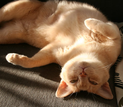 Cremefärgad burma, foto: Linda Andersson